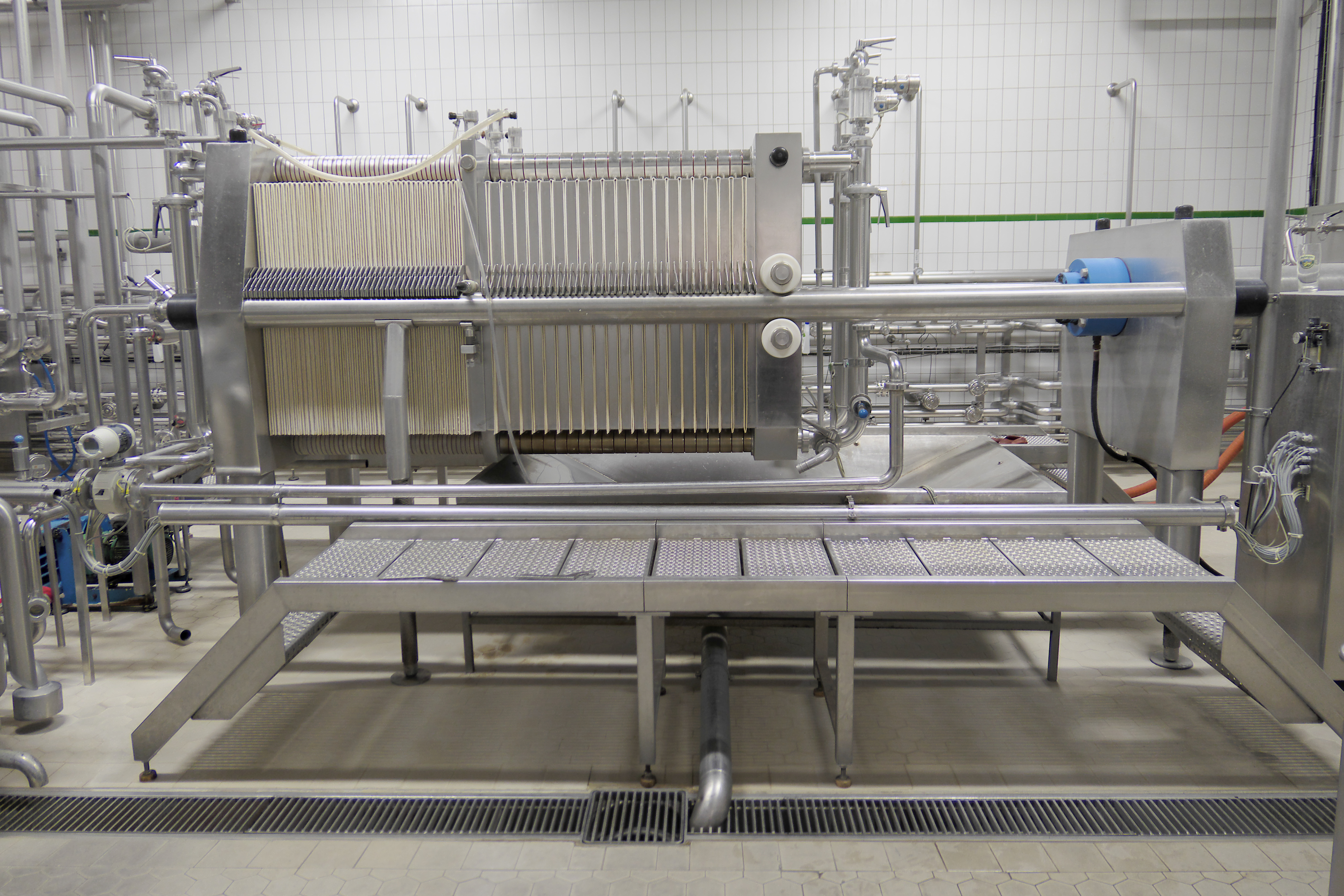 Filteranlage der Firma Seitz-Schenk (Baujahr 2001) für Bier, Filterung mit Kieselgur, Brauerei Aying, Bayern, Deutschland. Maximale Kapazität 1200 Hektoliter pro Tag. 40 Quadratmeter Kieselgur-Filtrationsfläche und 80 Quadratmeter Schichten-Filtrationsfläche.